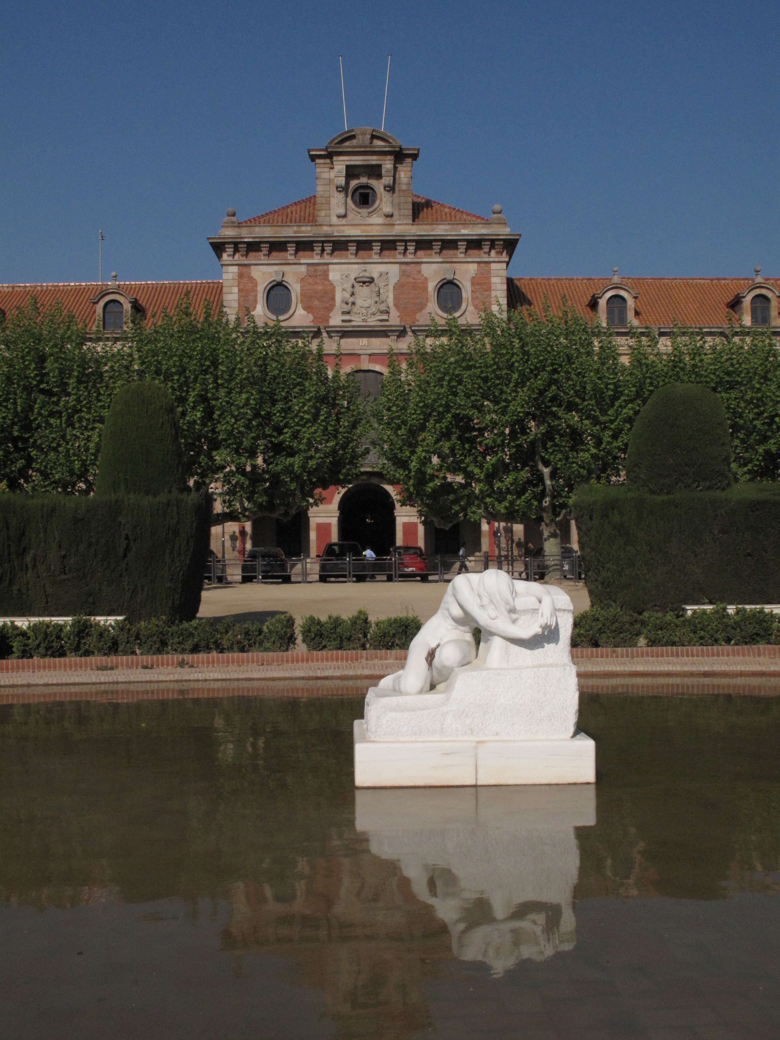 Escultura "Desconsol", de Josep Llimona, a l'estany del parc de la Ciutadella, al fons el Parlament de Catalunya (Barcelona)